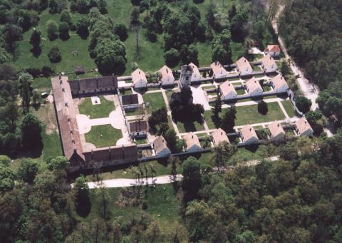 Majk, convent